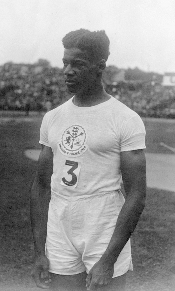 Colombes : France-Angleterre, athlétisme : London, gagnant du 100 m : [photographie de presse] / Agence Meurisse